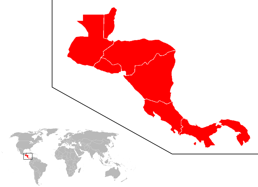 Ubicación del subcontinente centroamericano en el mundo. Location of the Central American subcontinent in the world.